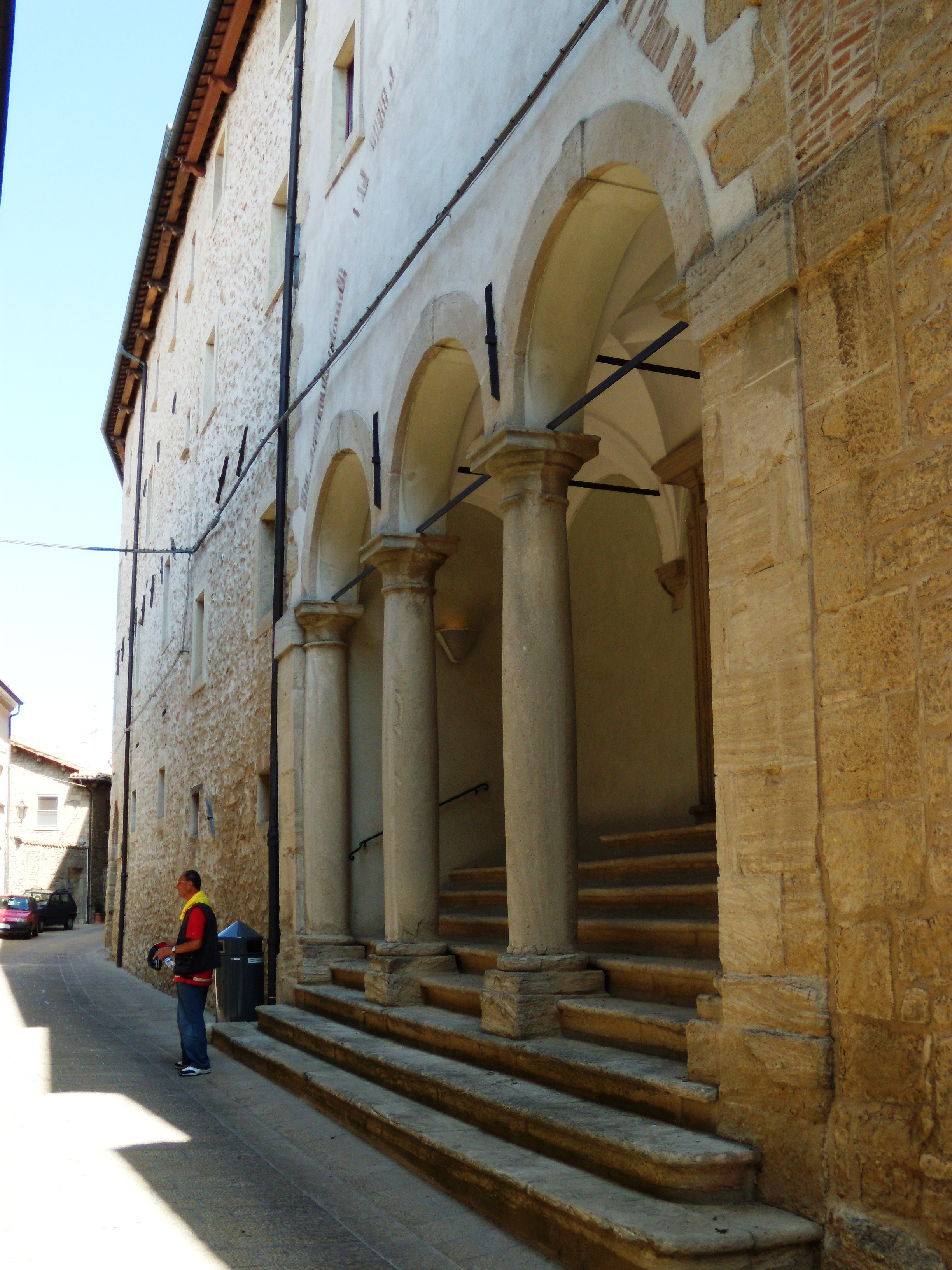 Chiesa di Santa Chiara a San Marino.